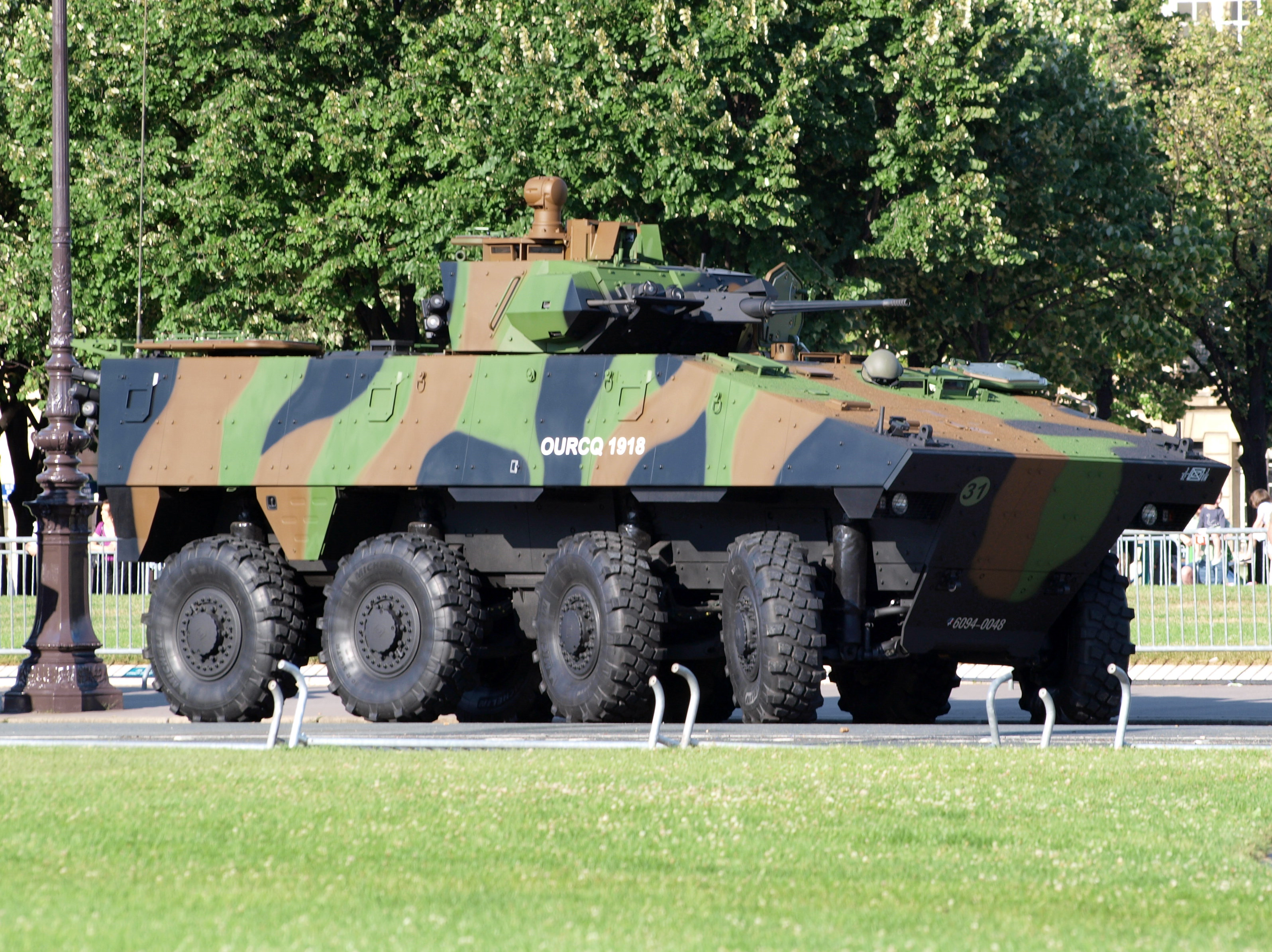 VBCI, (Véhicule Blindé de Combat de l'Infanterie), French army licence registration '6094 0048', OURCQ 1918